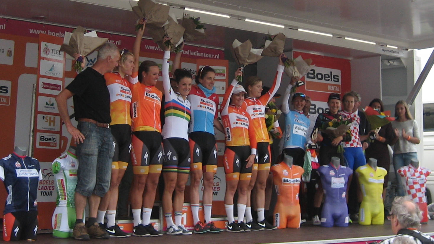 Boels Dolmans, winnaars van het ploegenklassement van de Boels Ladies Tour 2016, op de Cauberg in Valkenburg, Limburg.